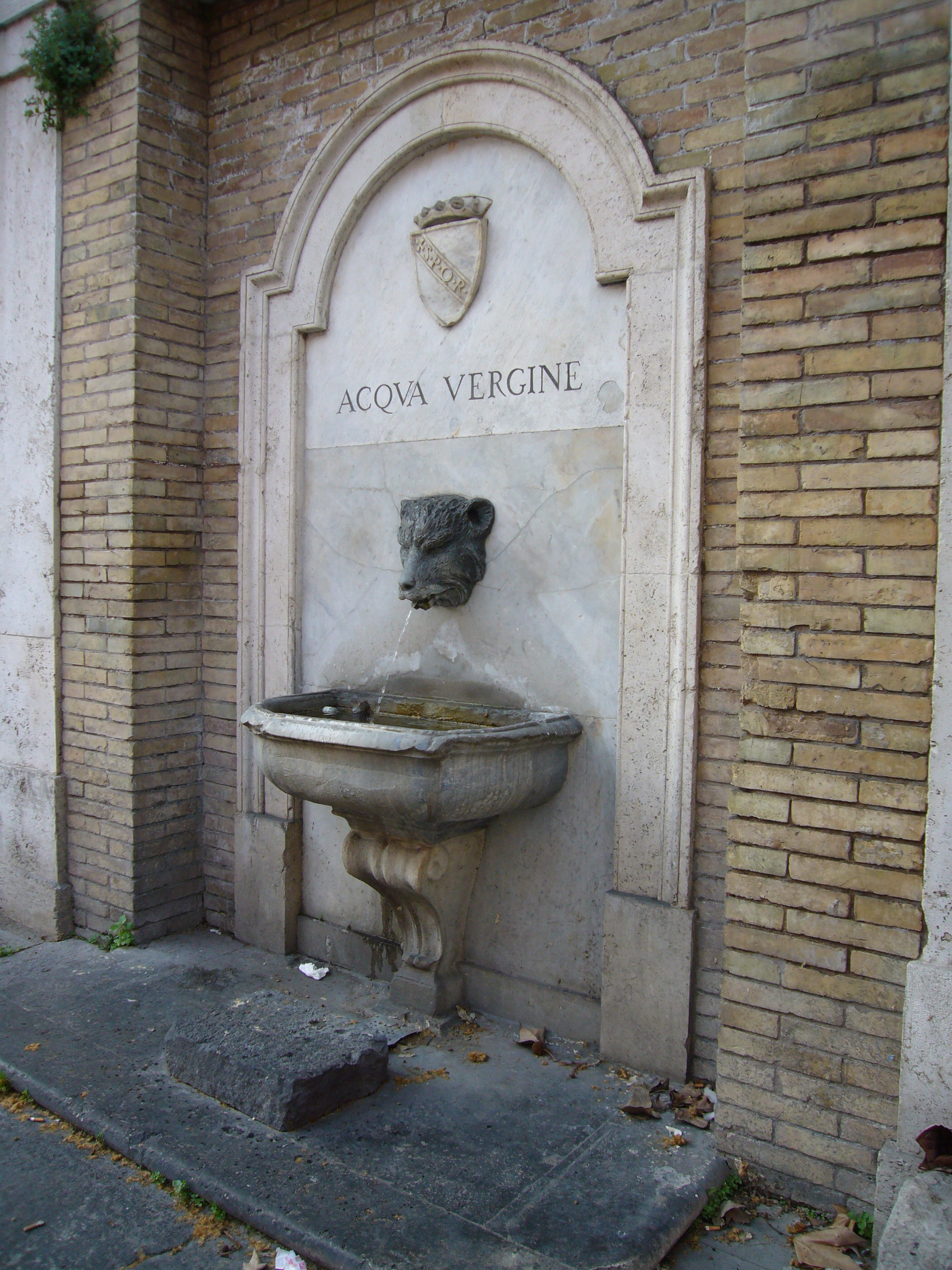 Roma, fontana dell'Acqua Vergine a via di Monte Brianzo